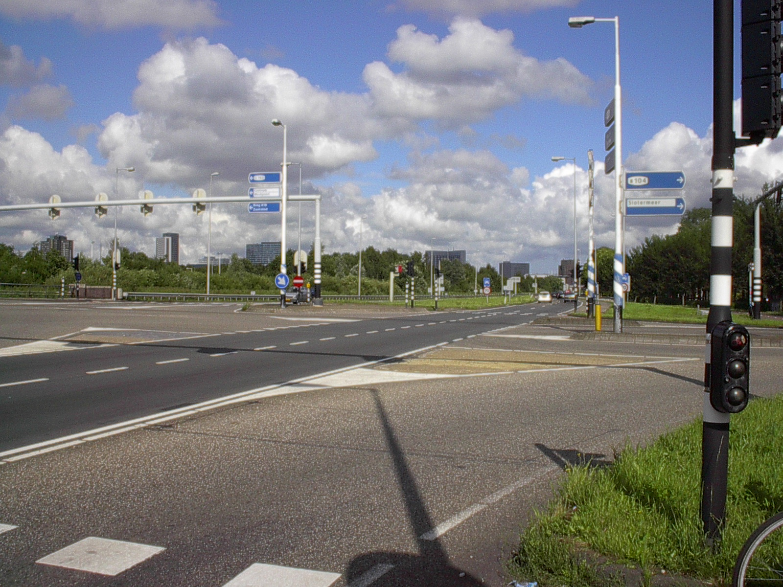 Haarlemmerweg / Burgemeester de Vlugtlaan (s104), Amsterdam Nieuw-West